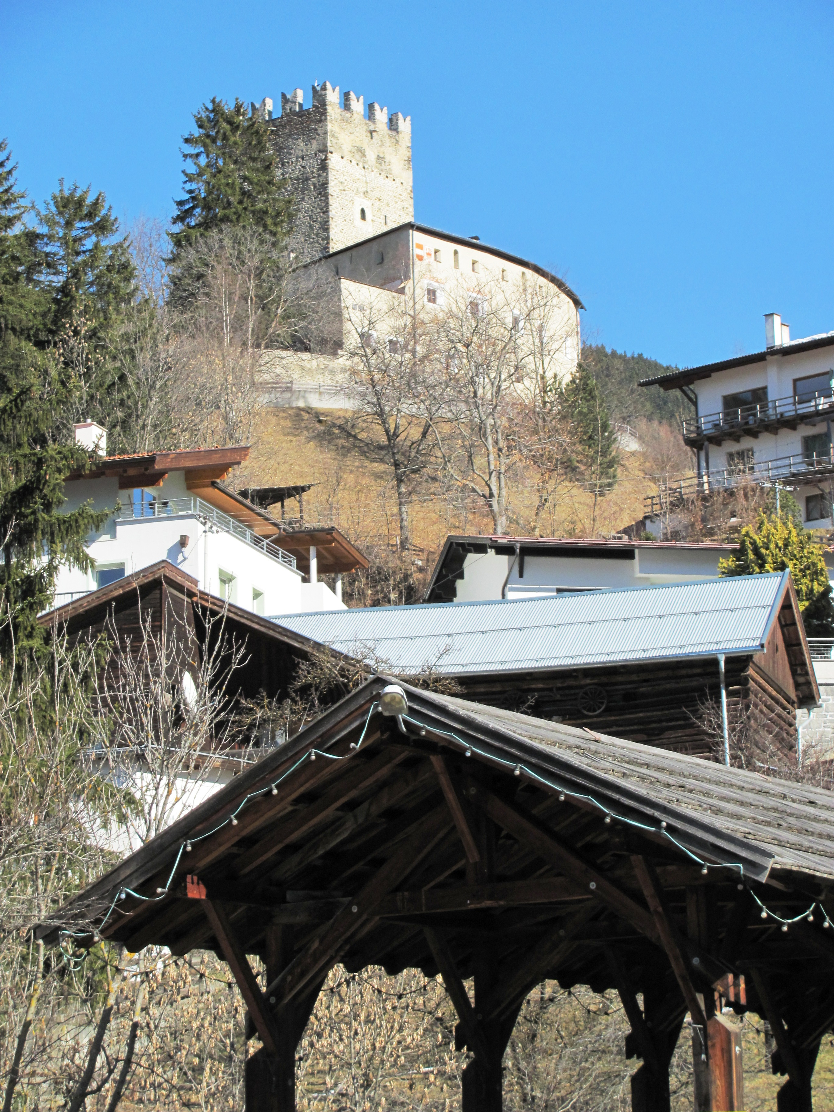 Burg Biedenegg und Zwinger zu Fließ, Gemeinde Fliess